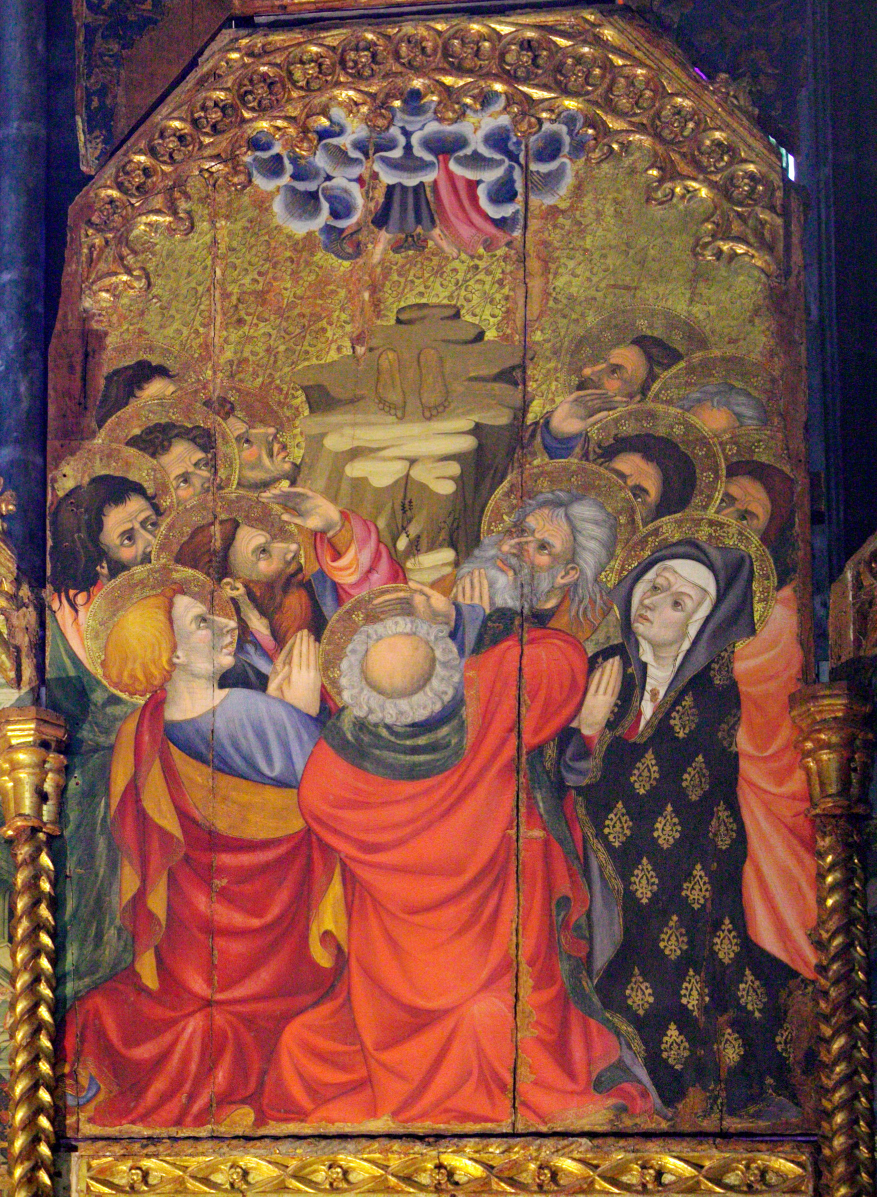 Taula de l'Ascensió de Jesús de l'antic retaule gòtic del Monestir de Santes Creus. Actualment està muntat sobre una nova estructura formant un retaule més petit a la catedral de Tarragona